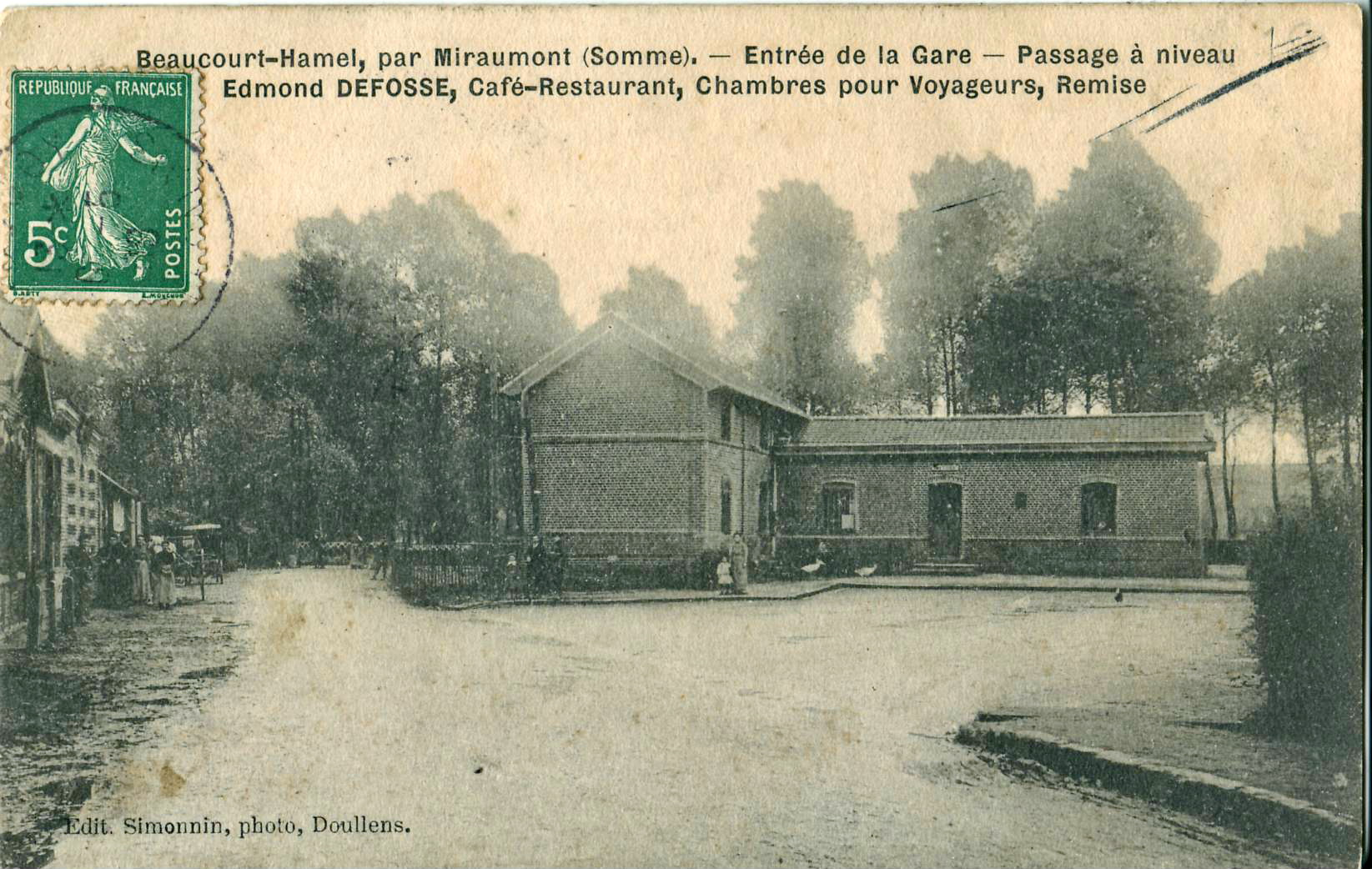 Carte postale ancienne éditée par Simonnin à Doullens :Beaucourt-Hamel par Miraumont - Entrée de la Gare - Passage à niveau - Edmond Defosse, café restaurant, chambre pour voyageurs, remise